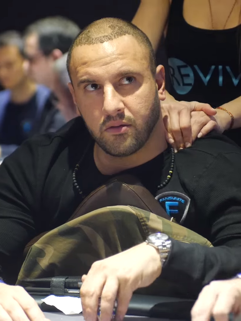 Michael Mizrachi bei der WPT Deeptstacks in Brüssel